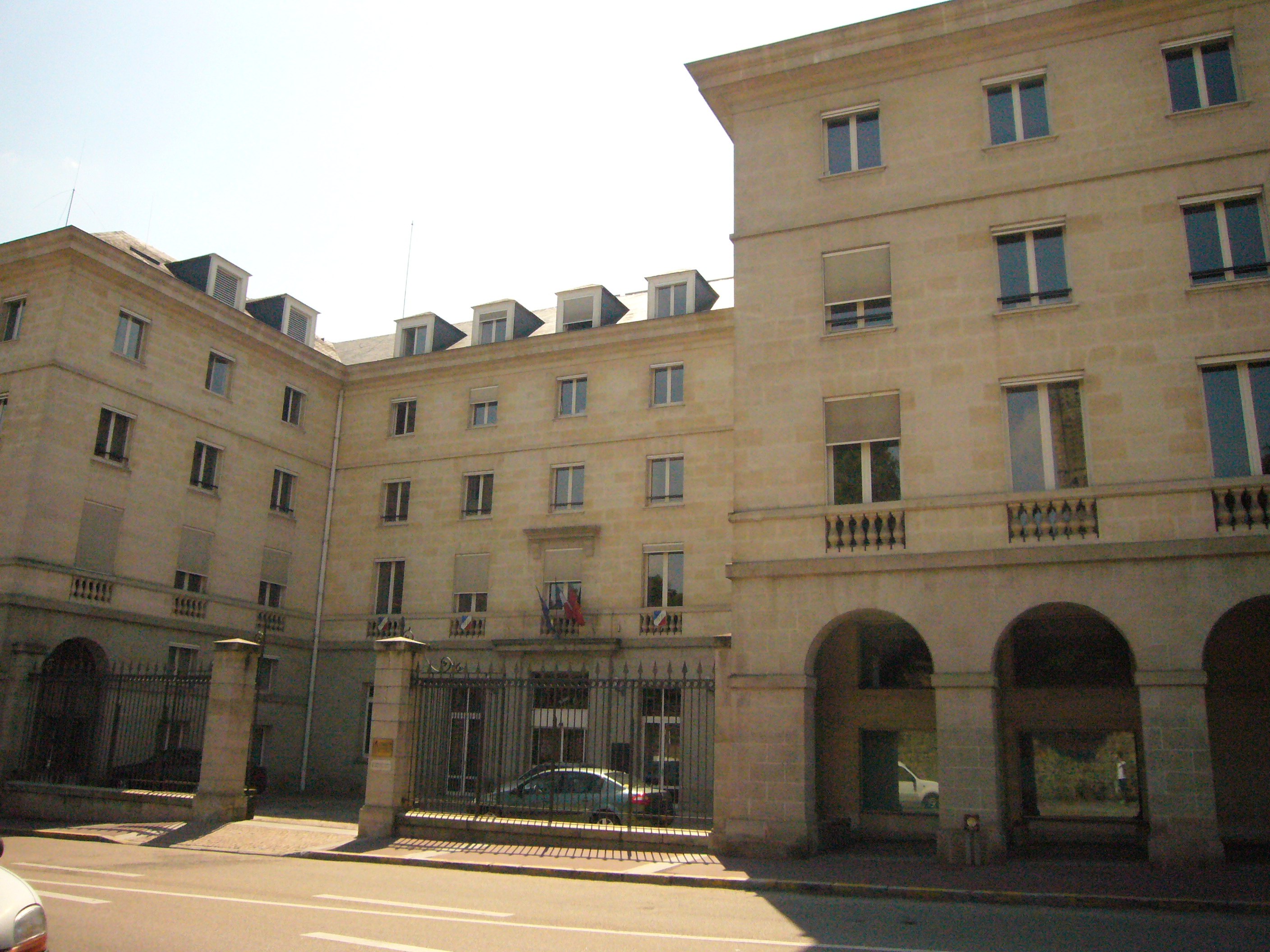 Ancien hôtel de région, siège du conseil régional du Limousin, Limoges (France)